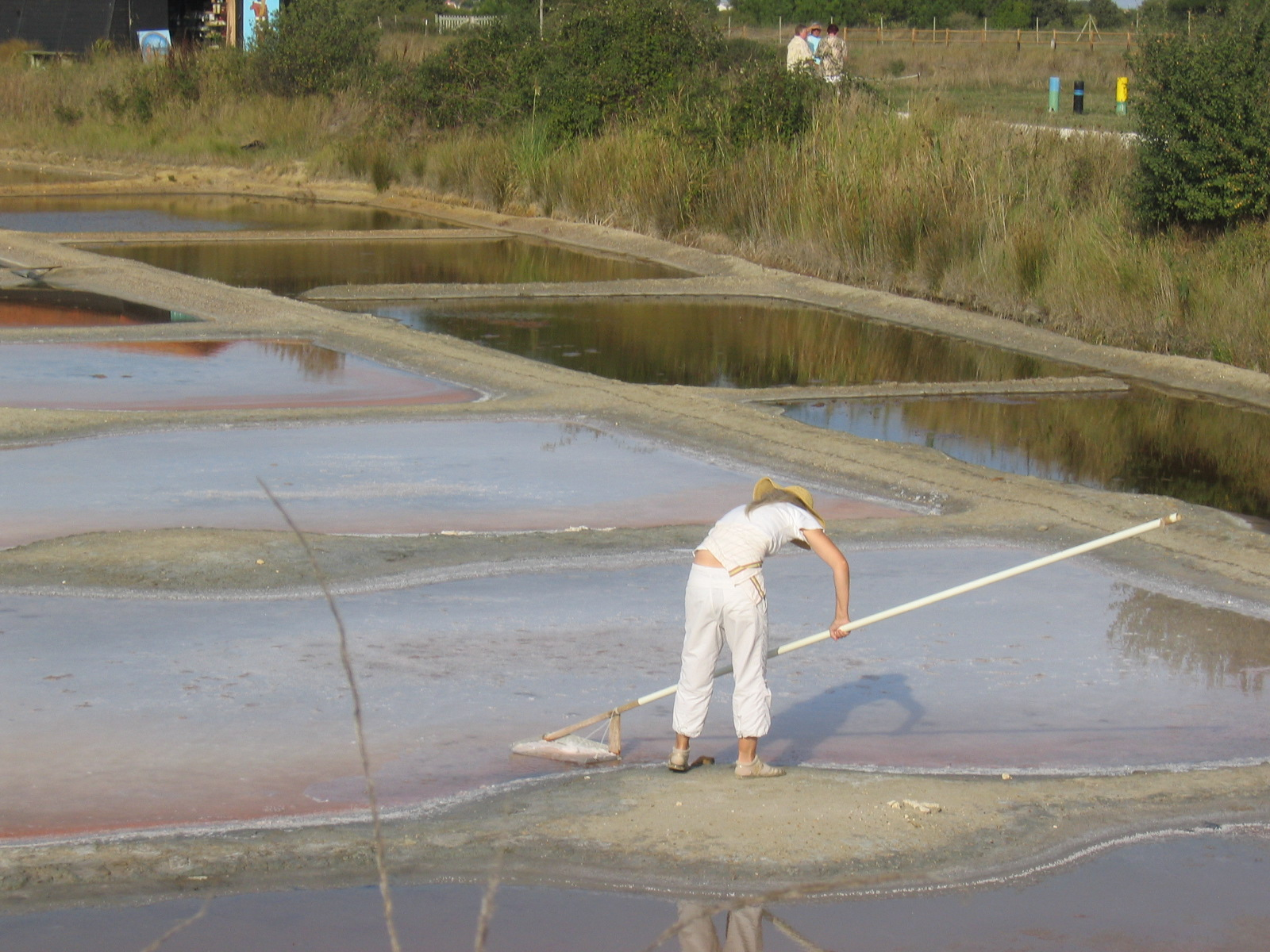 Au Port des Salines à Petit Village, dans le sud de l'île d'Oléron se trouvent des salines en exploitation ainsi qu'un musée du sel. Observer le geste effectué par cette personne.